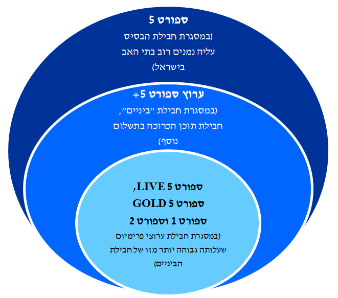 תרשים המתאר את השתייכות ערוצי הספורט לחבילות לפי עלותן